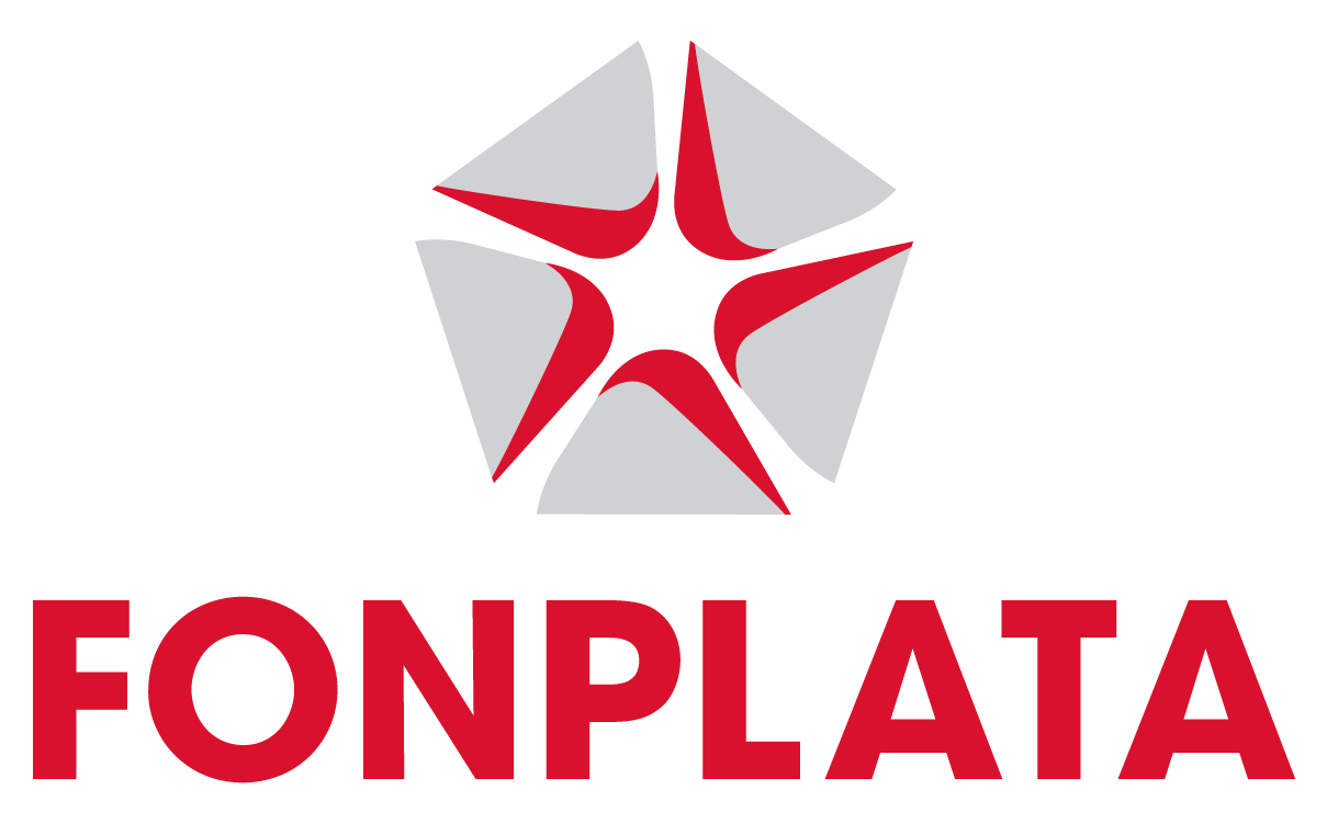 Logo FONPLATA